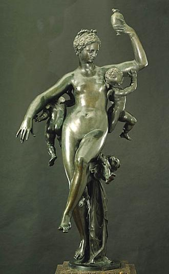 Psyke, buren av amoriner, Adriaen de Vries (1556-1627)